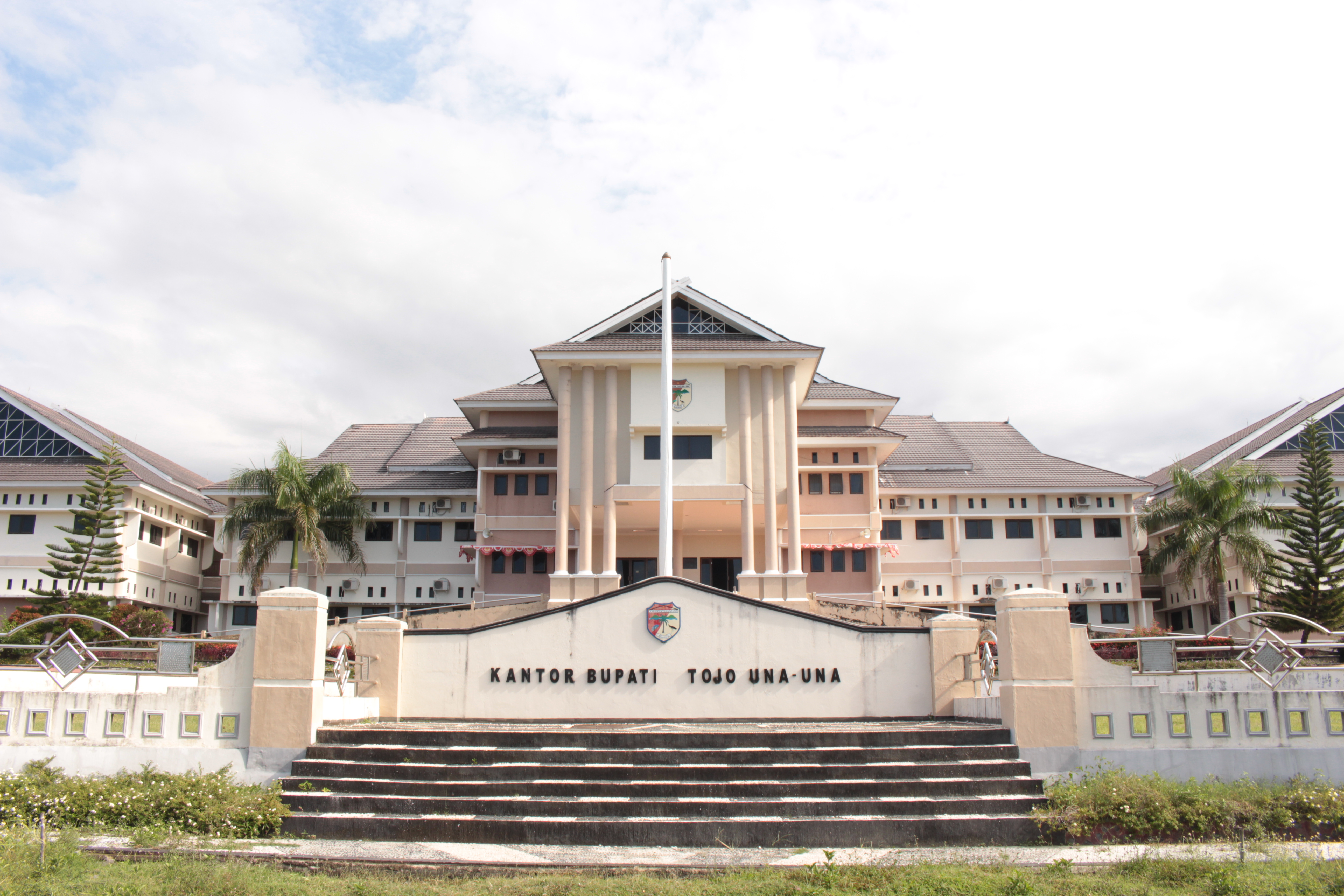 Kantor Bupati Tojo Una-Una, Sulawesi Tengah, Indonesia